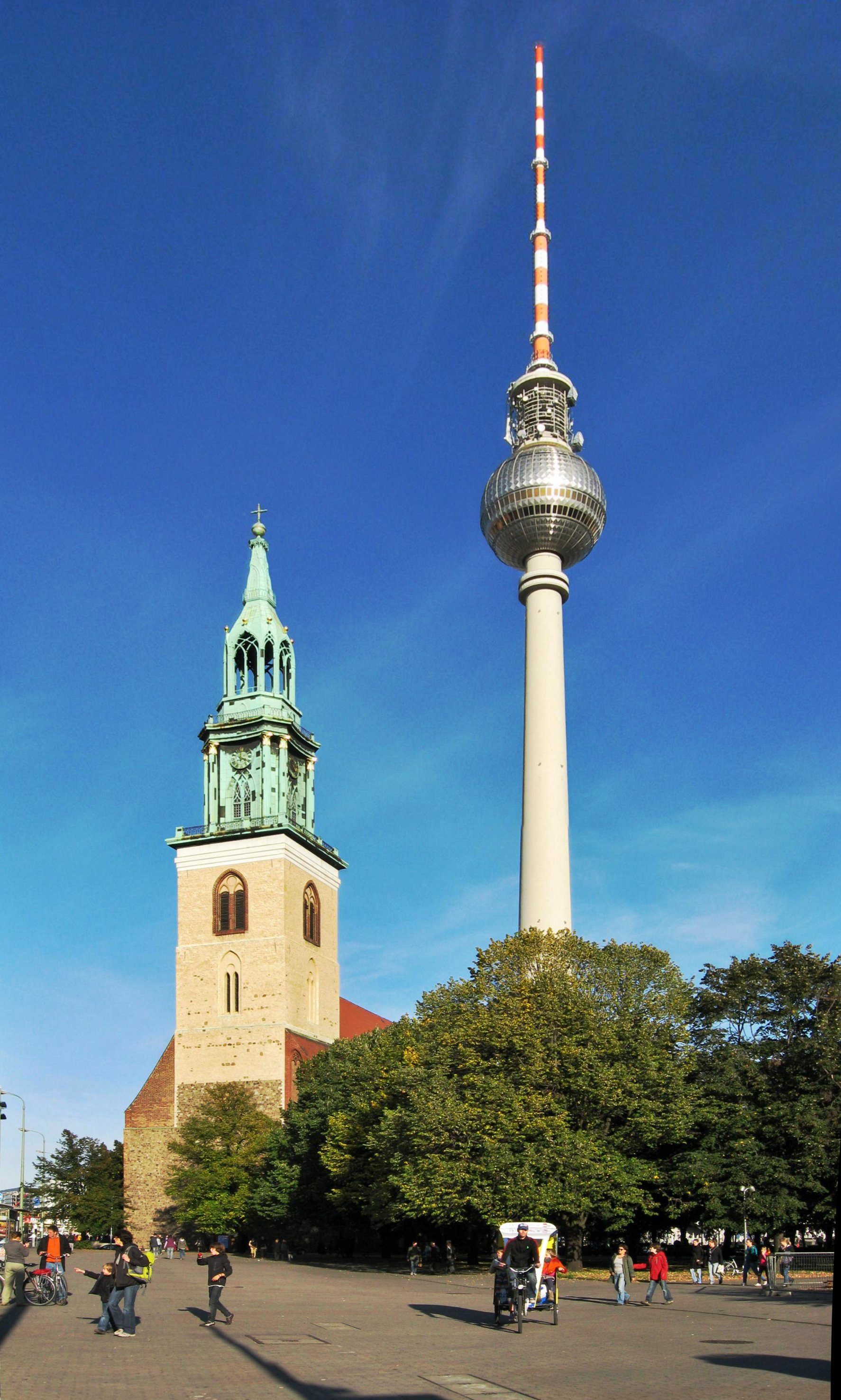 Marienkirche in Berlin-Mitte